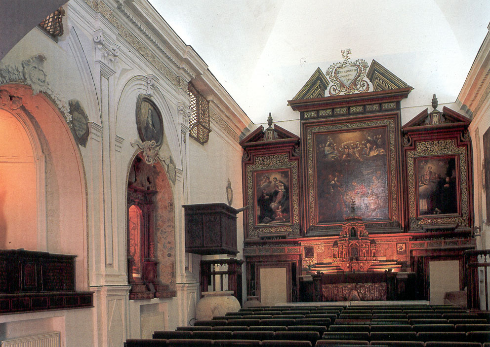 Aidone, EN_Sicilia: interno dela chiesa di San Francesco, detta dei Cappuccini, sede del Museo Archeologico